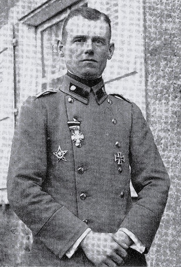 Hauptmann Willy Rohr, Kommandeur des Sturm-Bataillons Nr. 5 (Rohr).